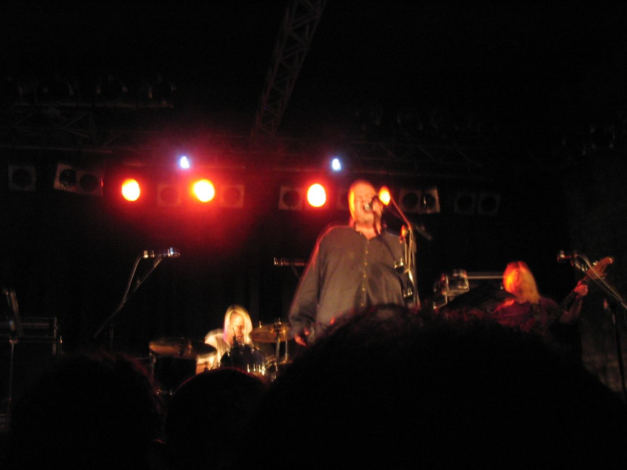 Pere Ubu en concert au Circolo degli Artisti à Rome.